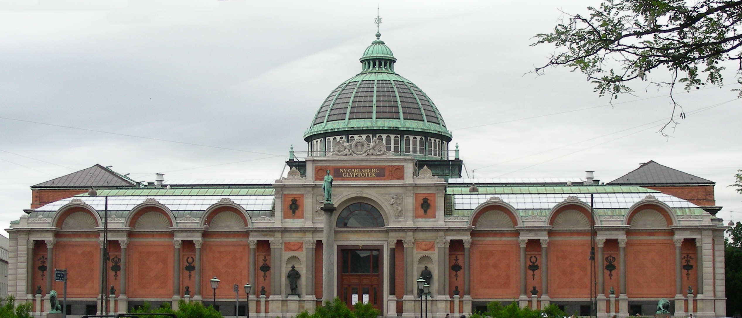 Ny Carlsberg Glyptotek, Copenhagen, Denmark.